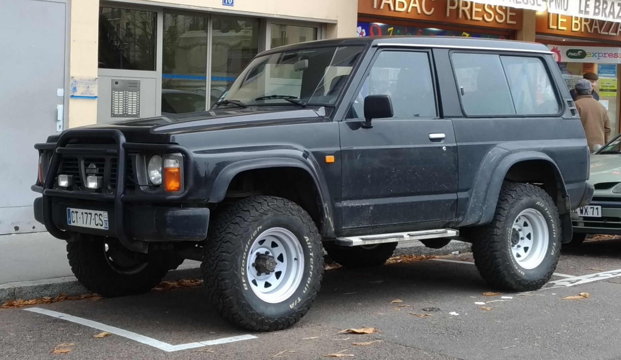 Nissan Patrol Y60 3D